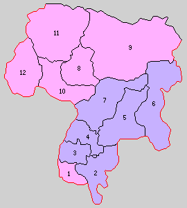 京都府北桑田郡の町村制時点の町村。